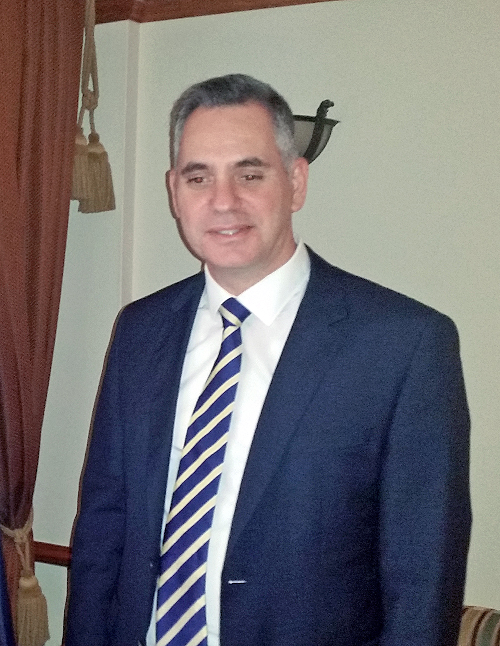 Ο ΥΠΕΞ Κοτζιάς με τον Πρόεδρο του ΔΗ.ΚΟ. Νικόλα Παπαδόπουλο Ο Υπουργός Εξωτερικών, κ. Νίκος Κοτζιάς, πραγματοποιεί την πρώτη του επίσημη επίσκεψη στο εξωτερικό κατά τη νέα του θητεία και θα μεταβεί, από τις 26 έως τις 28 Οκτωβρίου, στην Κυπριακή Δημοκρατία